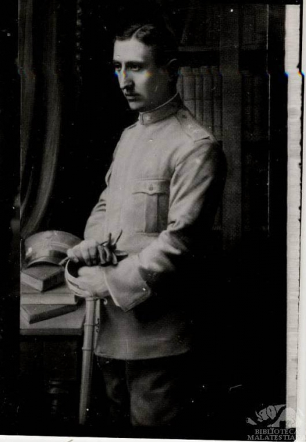 Renato Serra (1884 – 1915), critico letterario e scrittore italiano